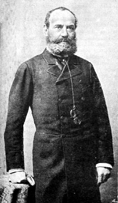 gróf Tisza Lajos (1832–1898) politikus, miniszter portréja. Ellinger Ede fényképfelvétele